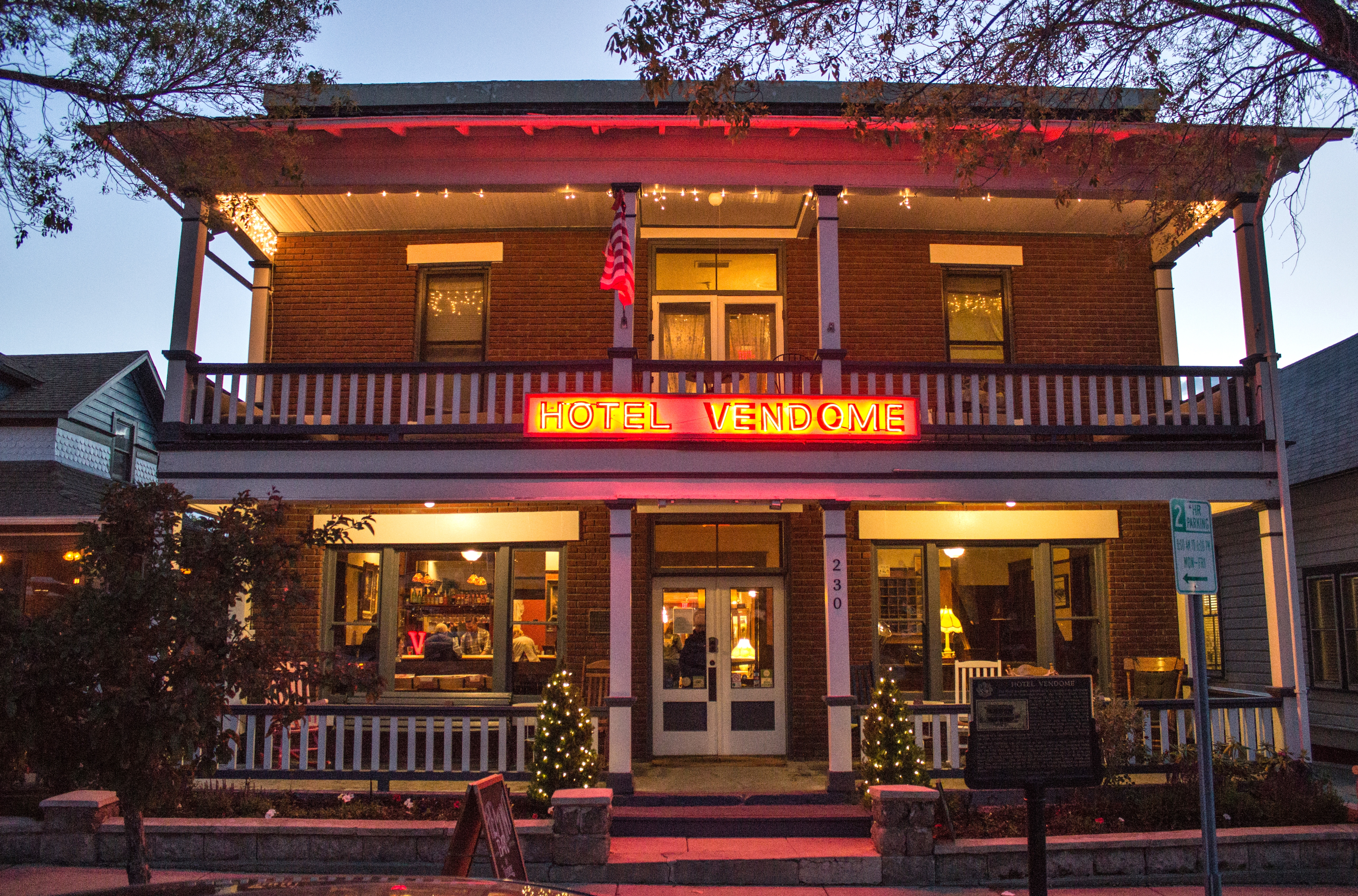 Prescott, Arizona.